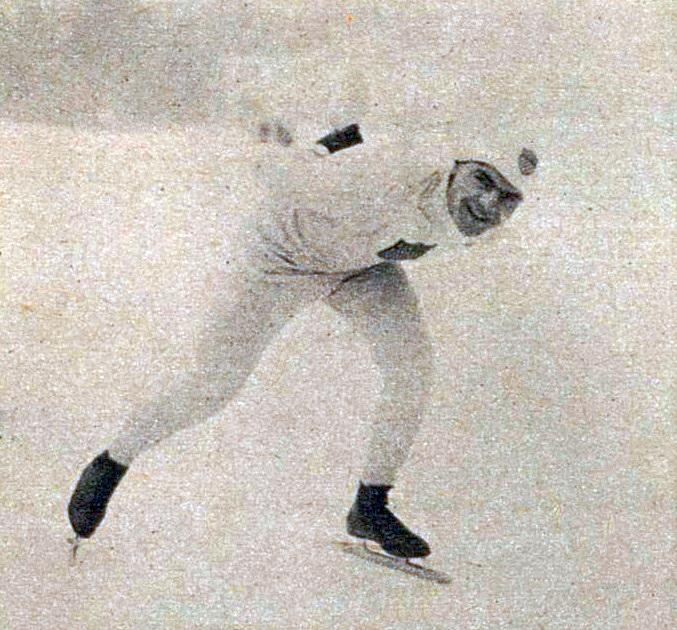 Clas Thunberg en 1924 à Chamonix.